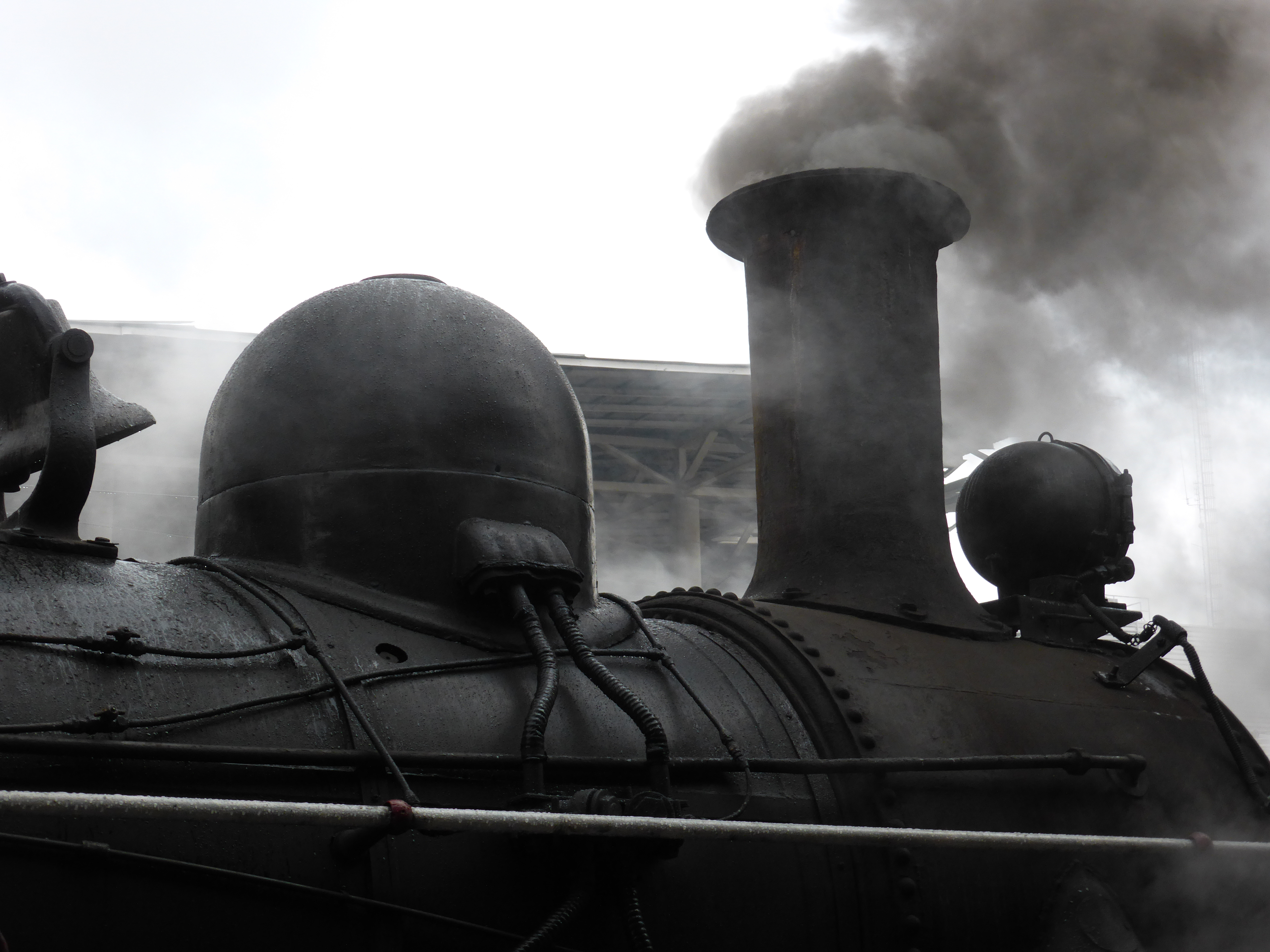 Detalle de la locomotora de vapor número 607 de "Ferrocarriles del Estado", con la chimenea humeando. Encendida, y maniobrando, se mostró el "Día del Patrimonio Cultural", a finales de mayo de 2016, en la Estación Central (o Estación Alameda) de Santiago de Chile. La locomotora 607, tipo 57, es de rodaje 130 (2-6-0). Chile contó con más de 100 locomotoras de vapor de este tipo, para trenes mercantes de vía o trocha ancha.